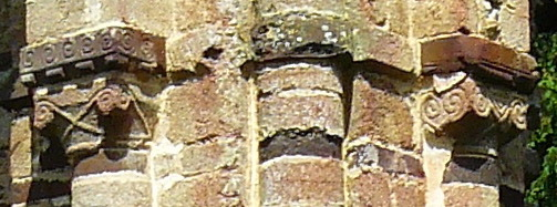 chapiteaux du chœur